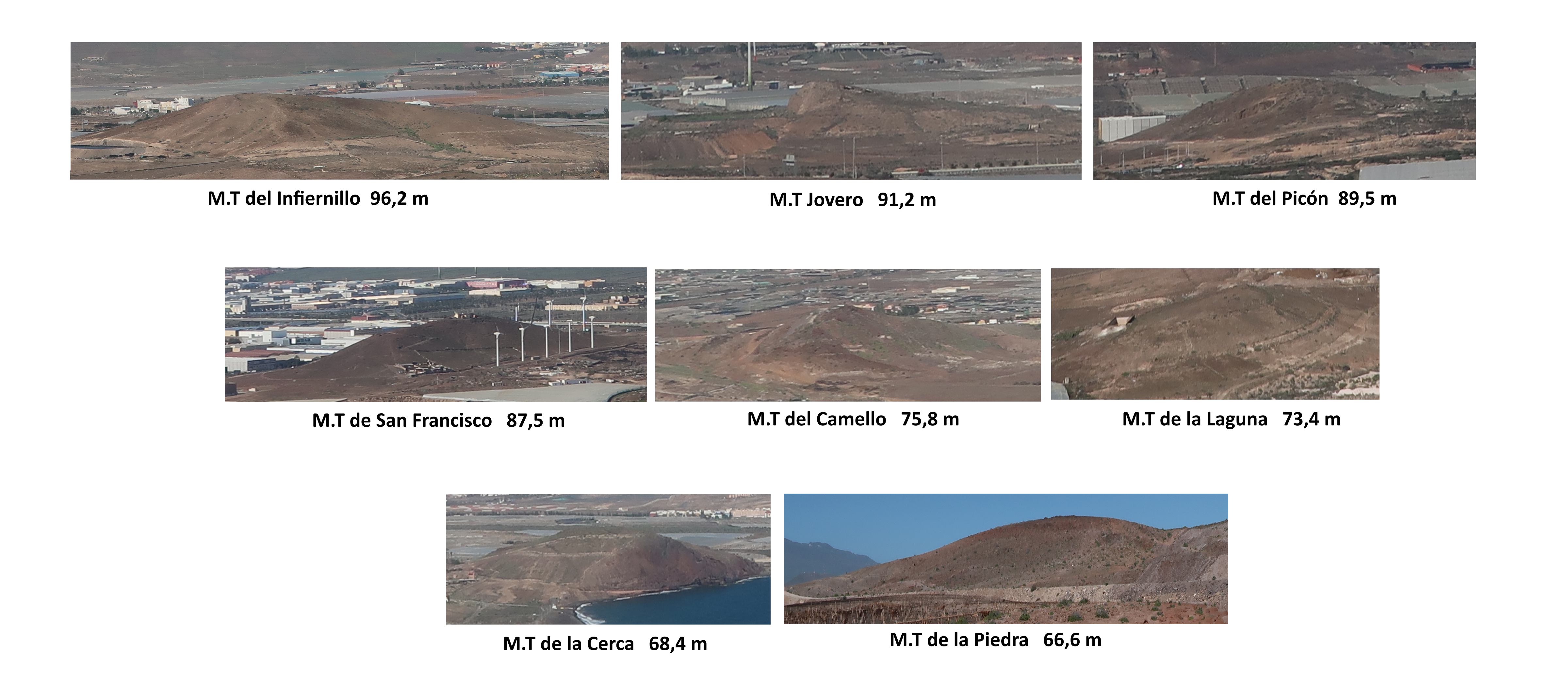 Estructuras volcánicas más relevantes de los Llanos